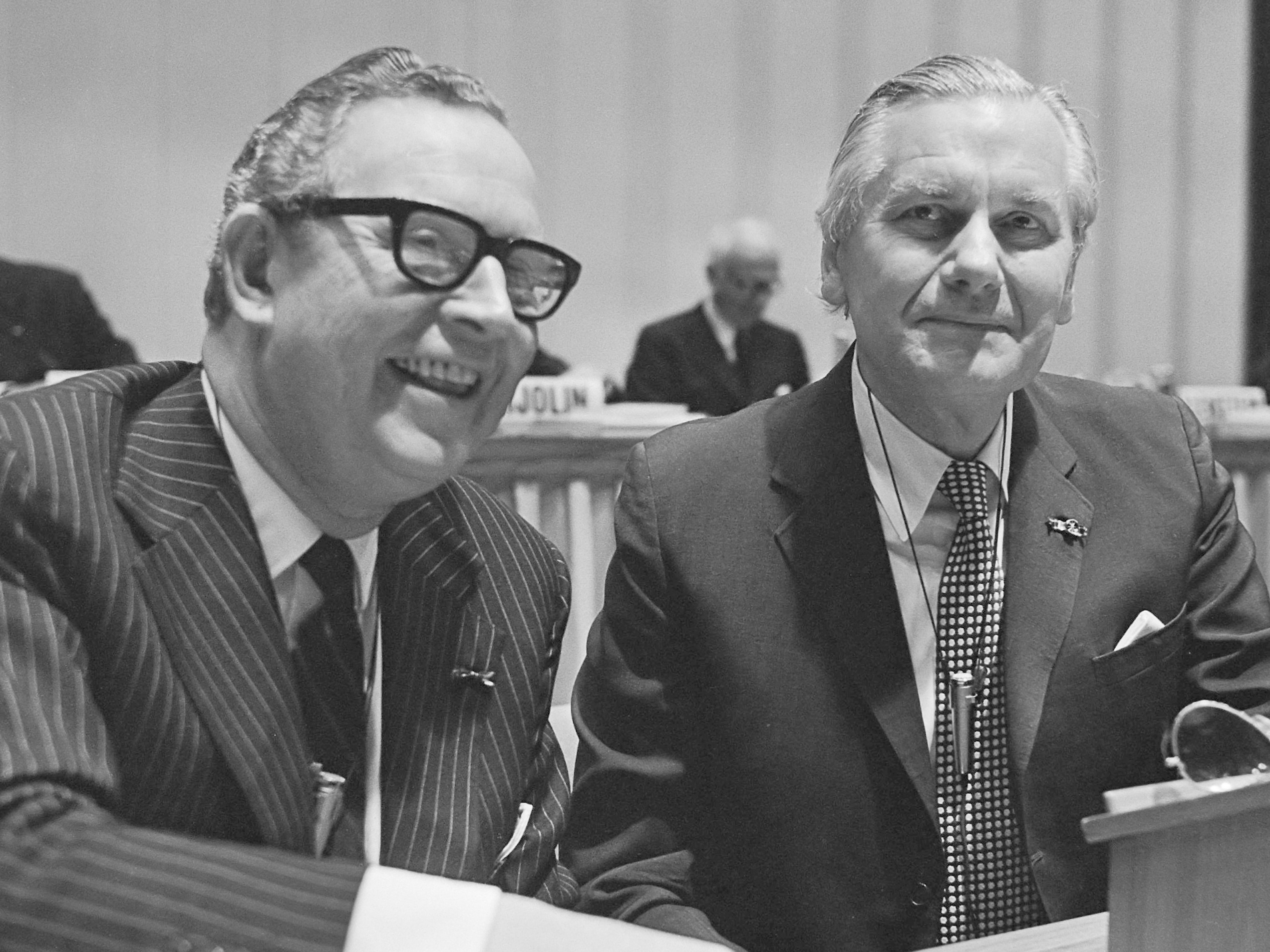 Shell aandeelhoudersverga- dering in Congresgebouw in Den Haag ; president directeur drs. D. de Bruyne (l) en mr.G.A.Wagner (pres. comm.) 20 mei 1980